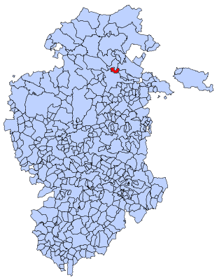 Situación de Cillaperlata en el mapa de Burgos.